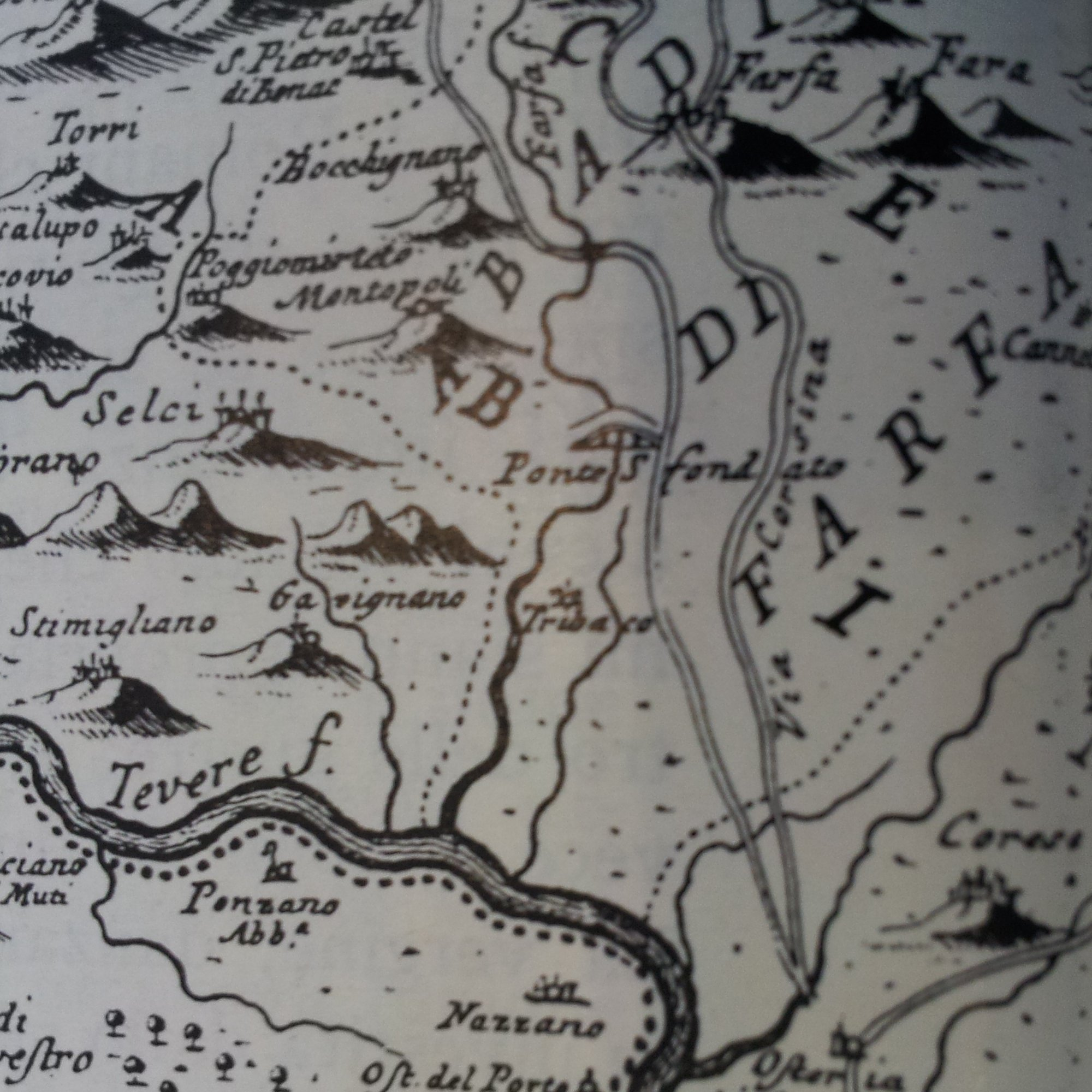 Particolare della carta geografica del Campiglia, con il psrticolare di ponte Sfondato